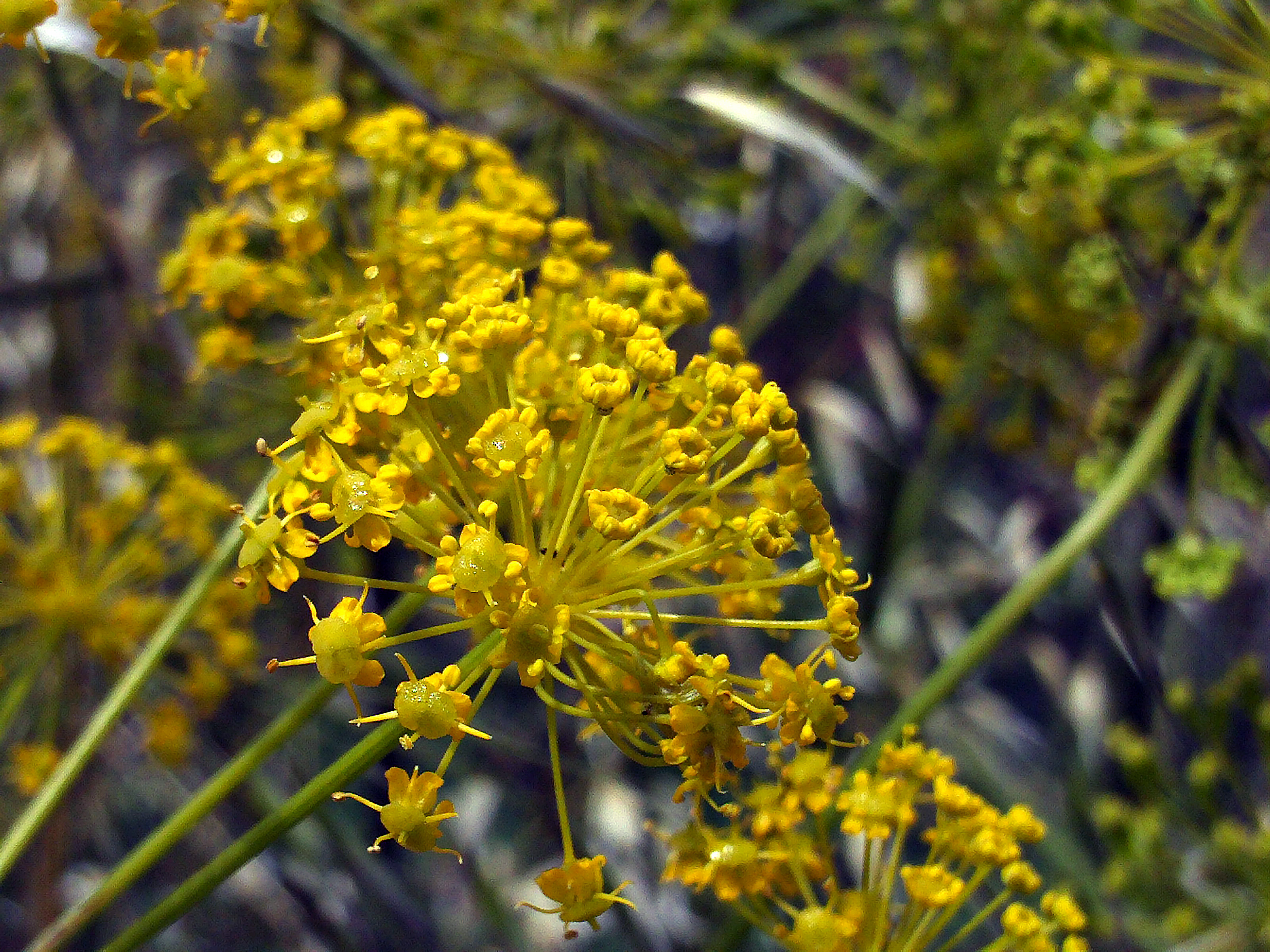 Thapsia villosa Inflorescence Closeup Puertollano, May, 24 , 2008.